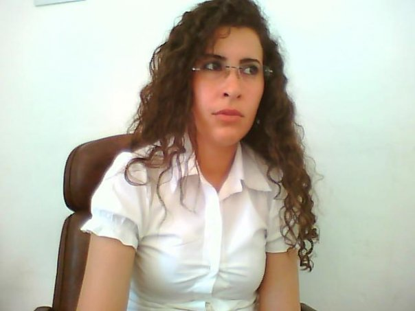 mouna eloueslati , membre du bureau exécutif de l'union général des etudiants de la tunisie 2003